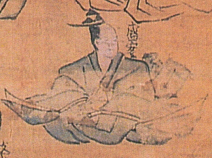 戸沢家18代戸沢盛安の肖像画(戸沢家歴代肖像より)。